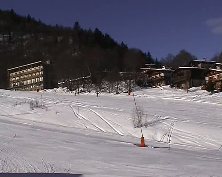 Piste de ski et chalets de la station des Monts d'Olmes (09)